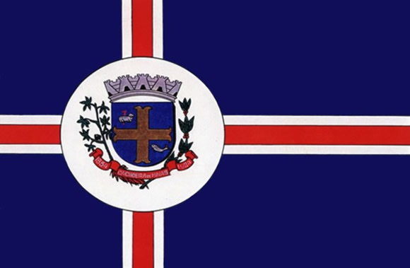 Bandeira do município de Cachoeira de Minas, Minas Gerais, Brasil.